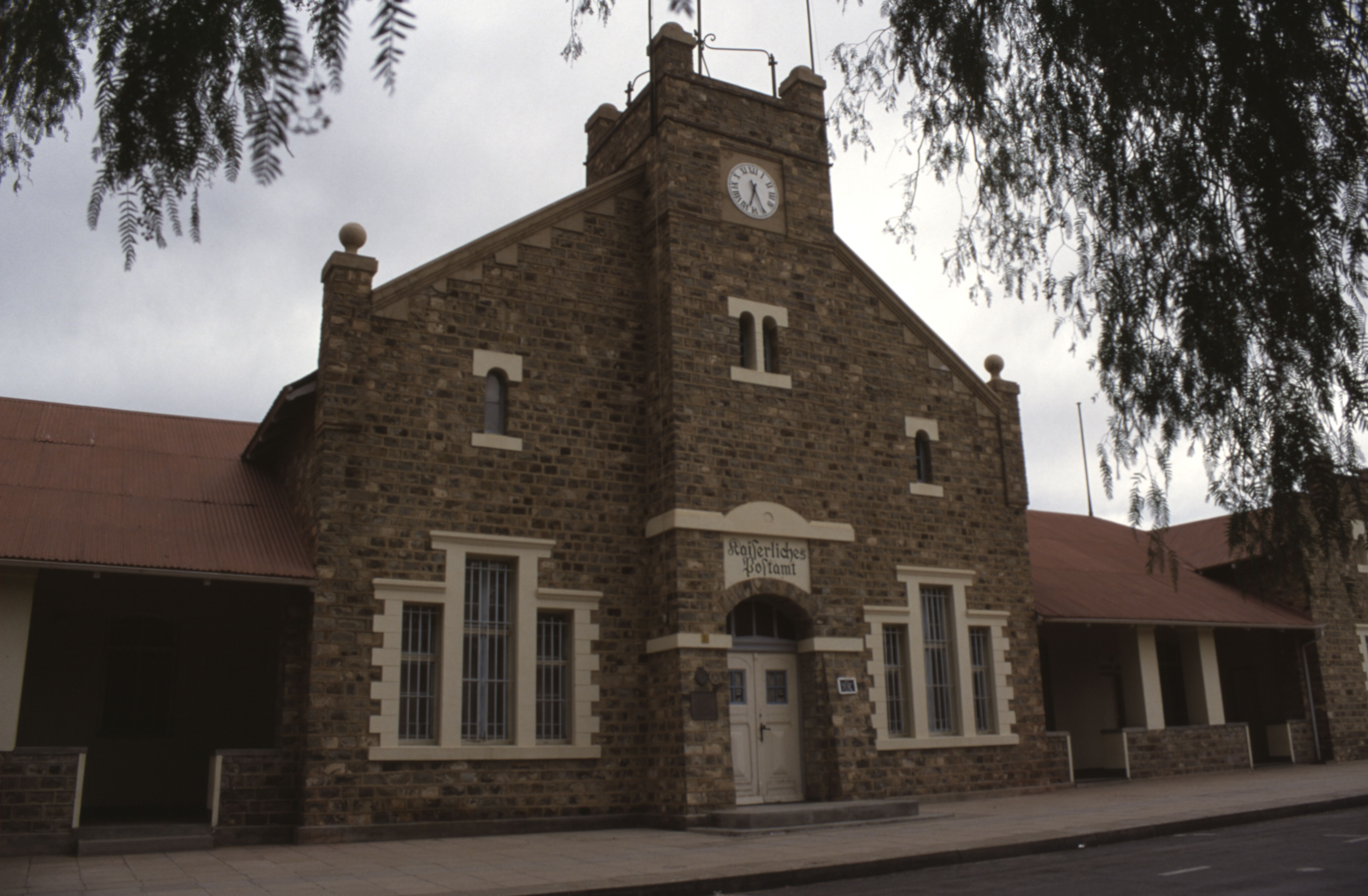 Namibia, Oktober 2002.